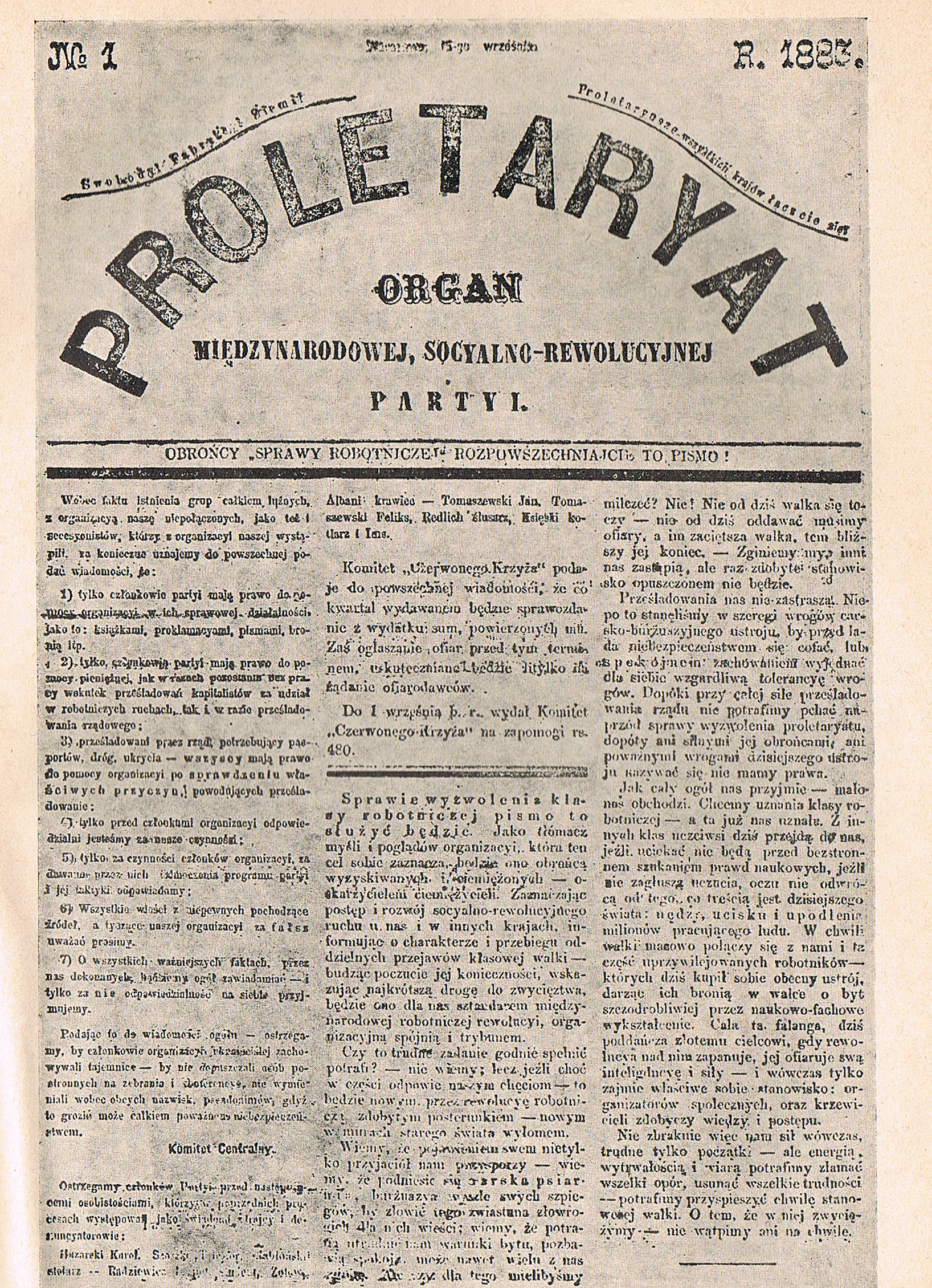 Pismo Socjalno-Rewolucyjnej Partii "Proletariat" z 1883